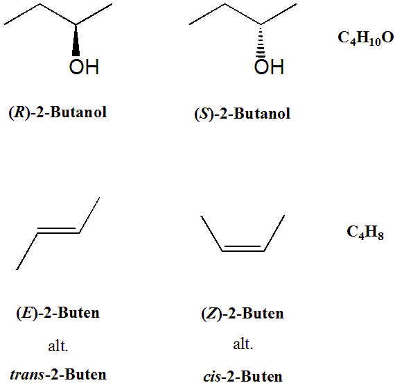 Struktur: Tor Svensson